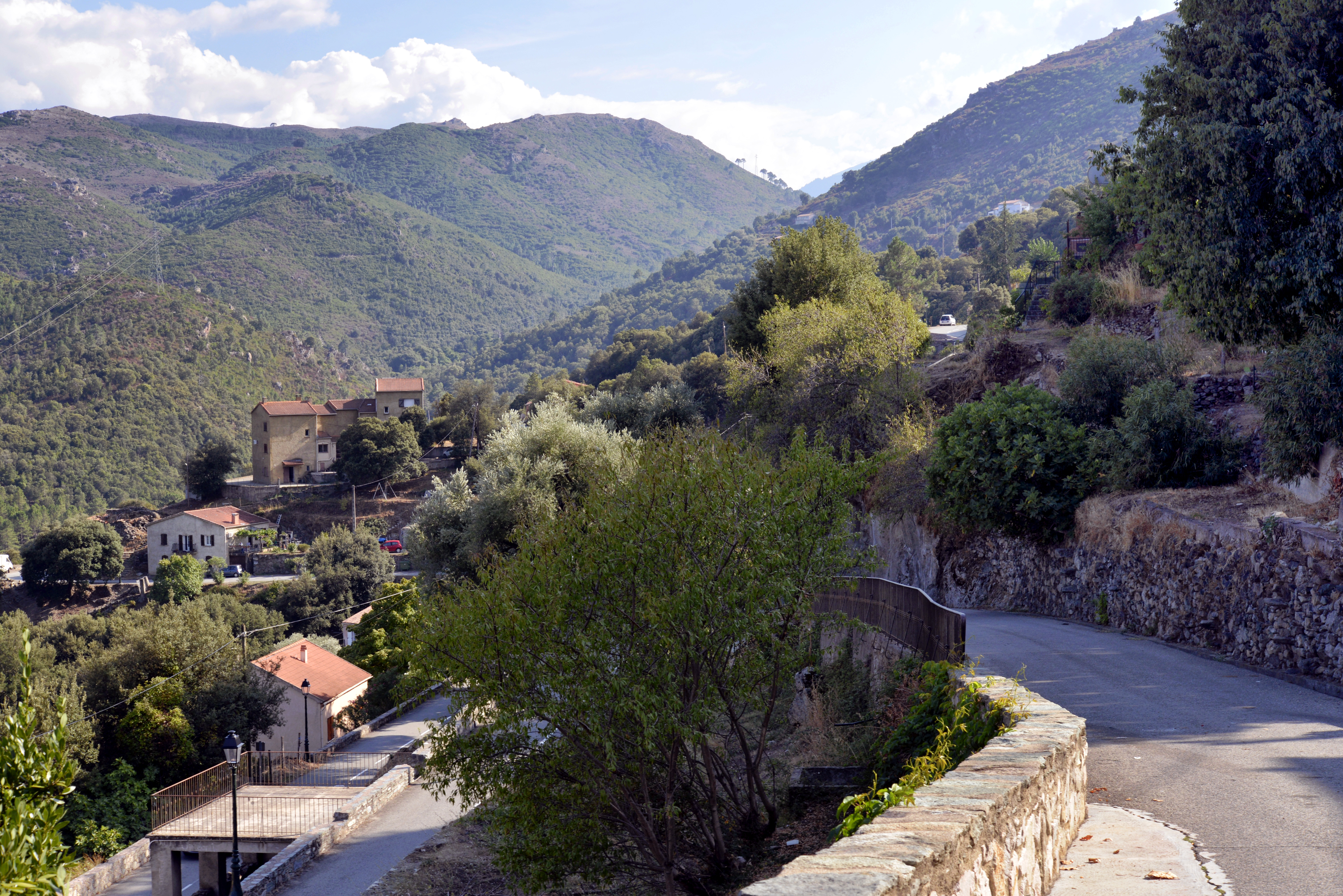 Castirla, Talcini (Haute-Corse) - Le hameau de Licceto vu depuis la mairie